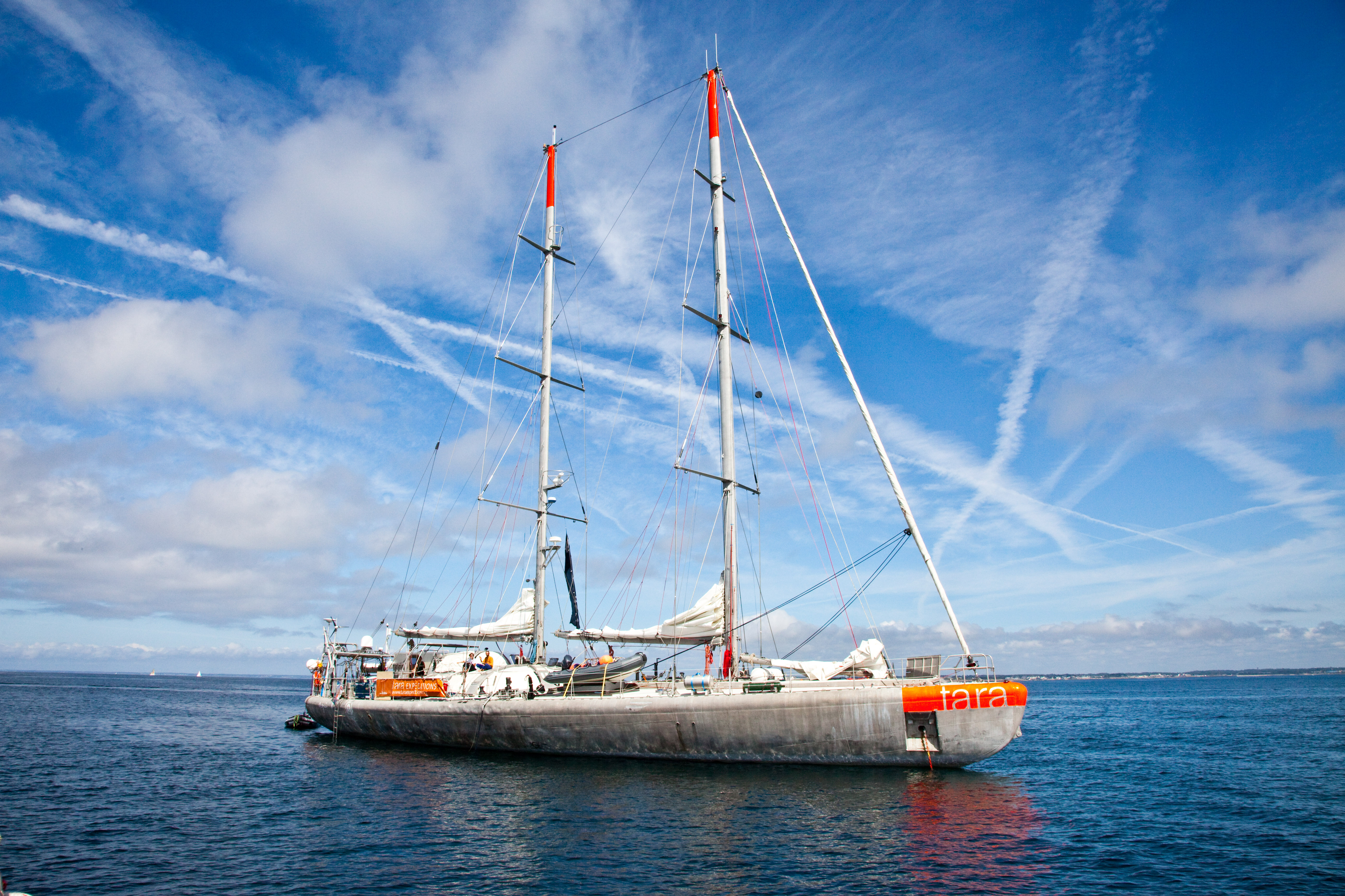 Le Navire TARA : Tara est la goélette précédemment baptisée Antarctica, avec laquelle l'explorateur Jean-Louis Étienne a effectué ses voyages polaires dans les années 1990, puis ayant appartenu au navigateur Peter Blake sous le nom de Seamaster